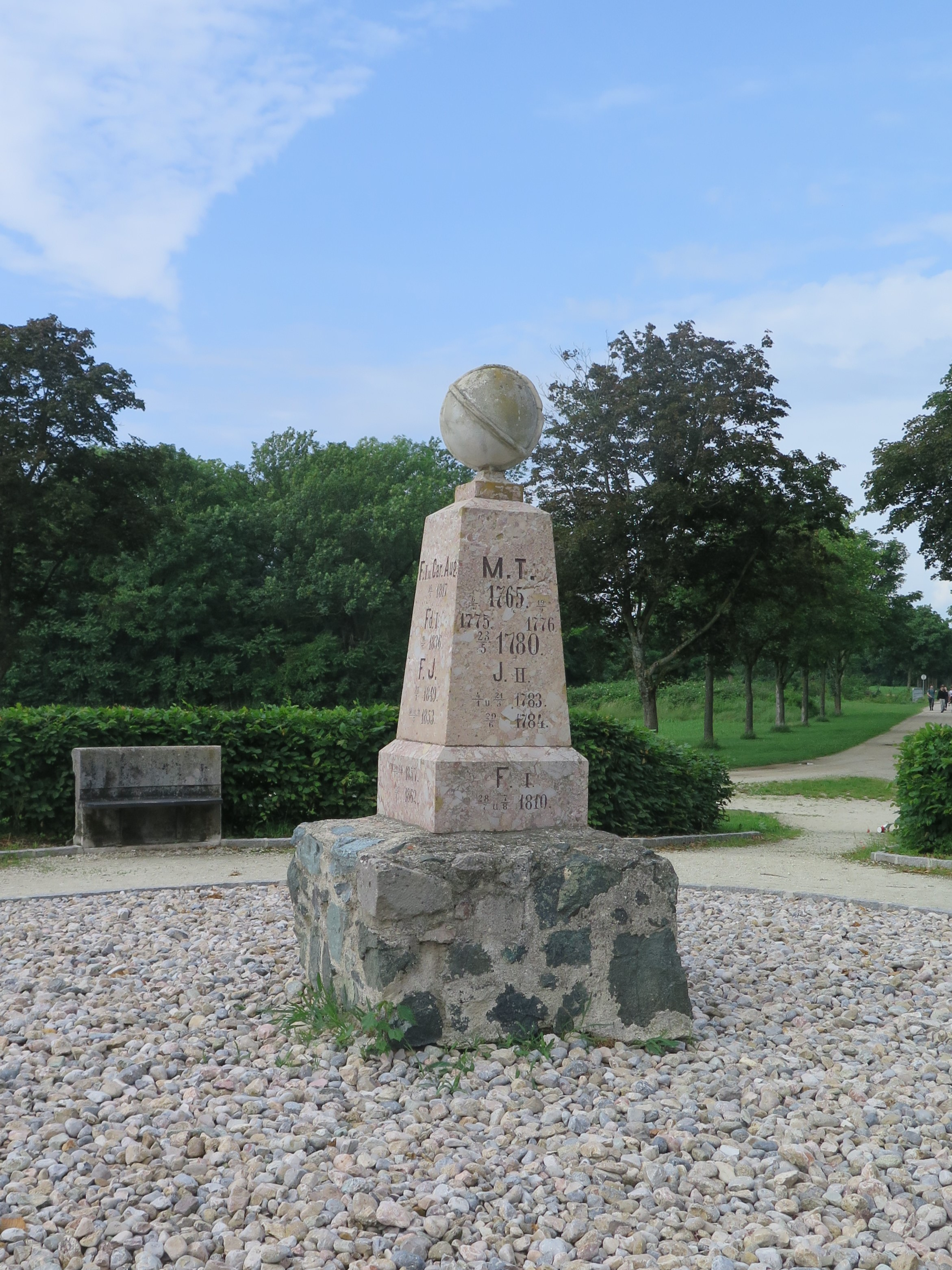 Verlobungsstein im Akademiepark Wr. Neustadt